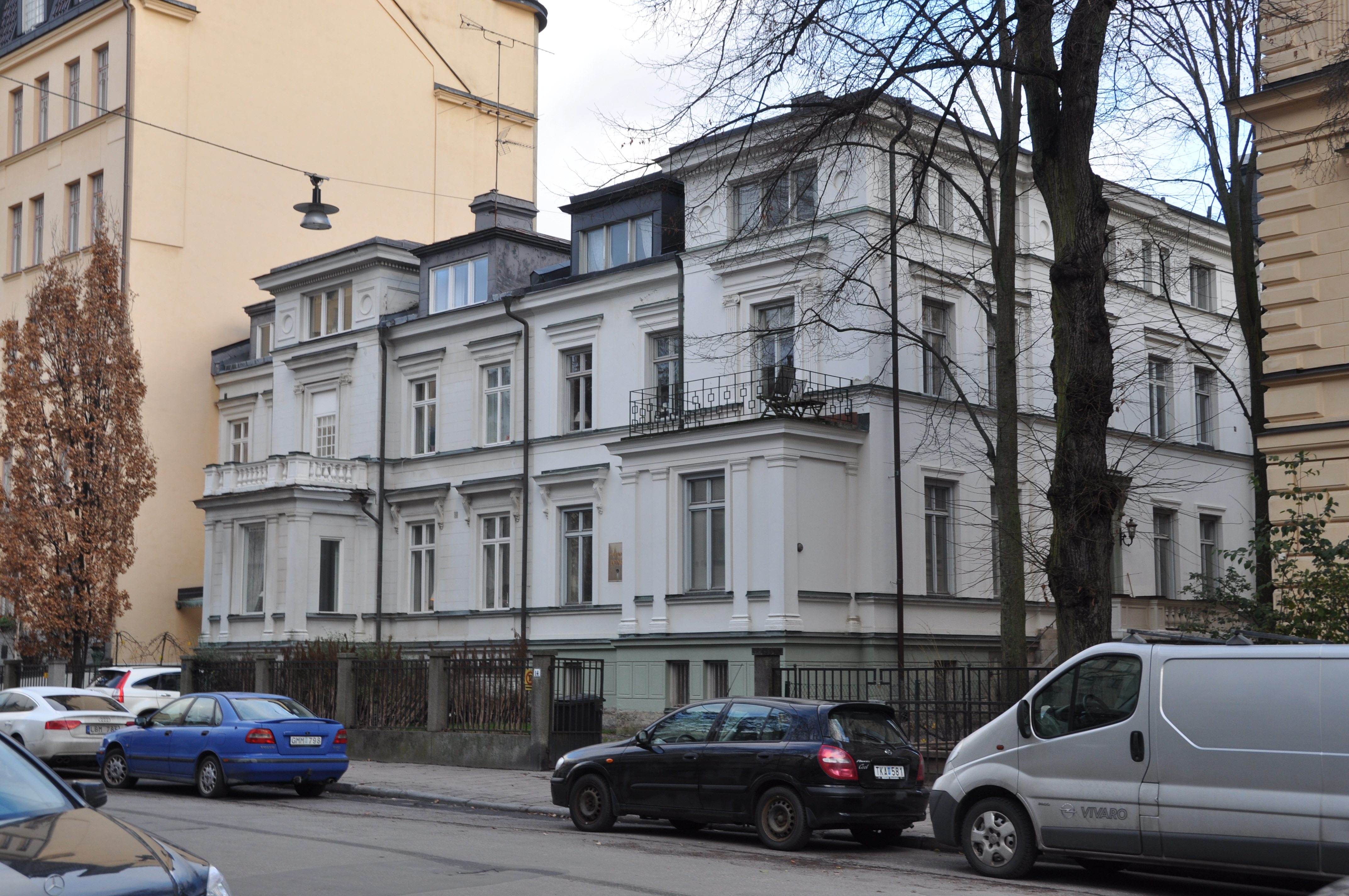 Granen 12, Villagatan 14. Byggnadsår 1876, arkitekter Axel & Hjalmar Kumlien, bygg- herre G A Beer, byggmästare J Möller. Villan donerades på 1910-talet av författarinnanLotten von Kraemer till Samfundet De Nio